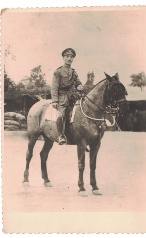 שמשון בלוך על סוס צולם בשנת 1918 בבקעת הירדן סמוך ליריחו עם גדוד 39 של קלעי המלך